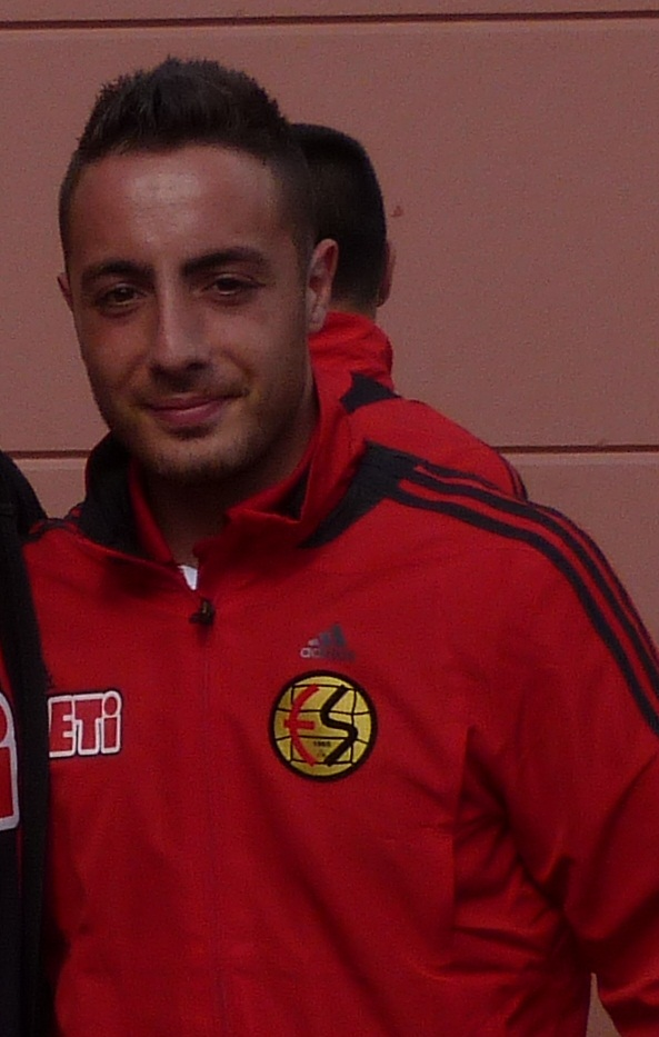 Mehmet boztepe